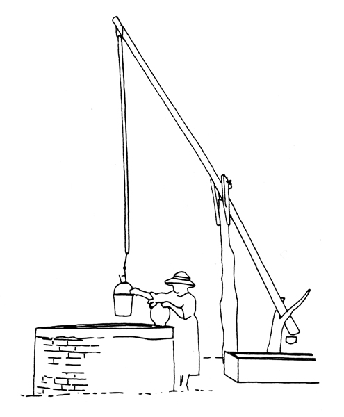 Puits à balancier à Sabres, département des Landes, France (dessin d'après une photo des années 1930) / Balancing well at Sabres, Landes department, France (sketch from a photo taken in the 1930s).